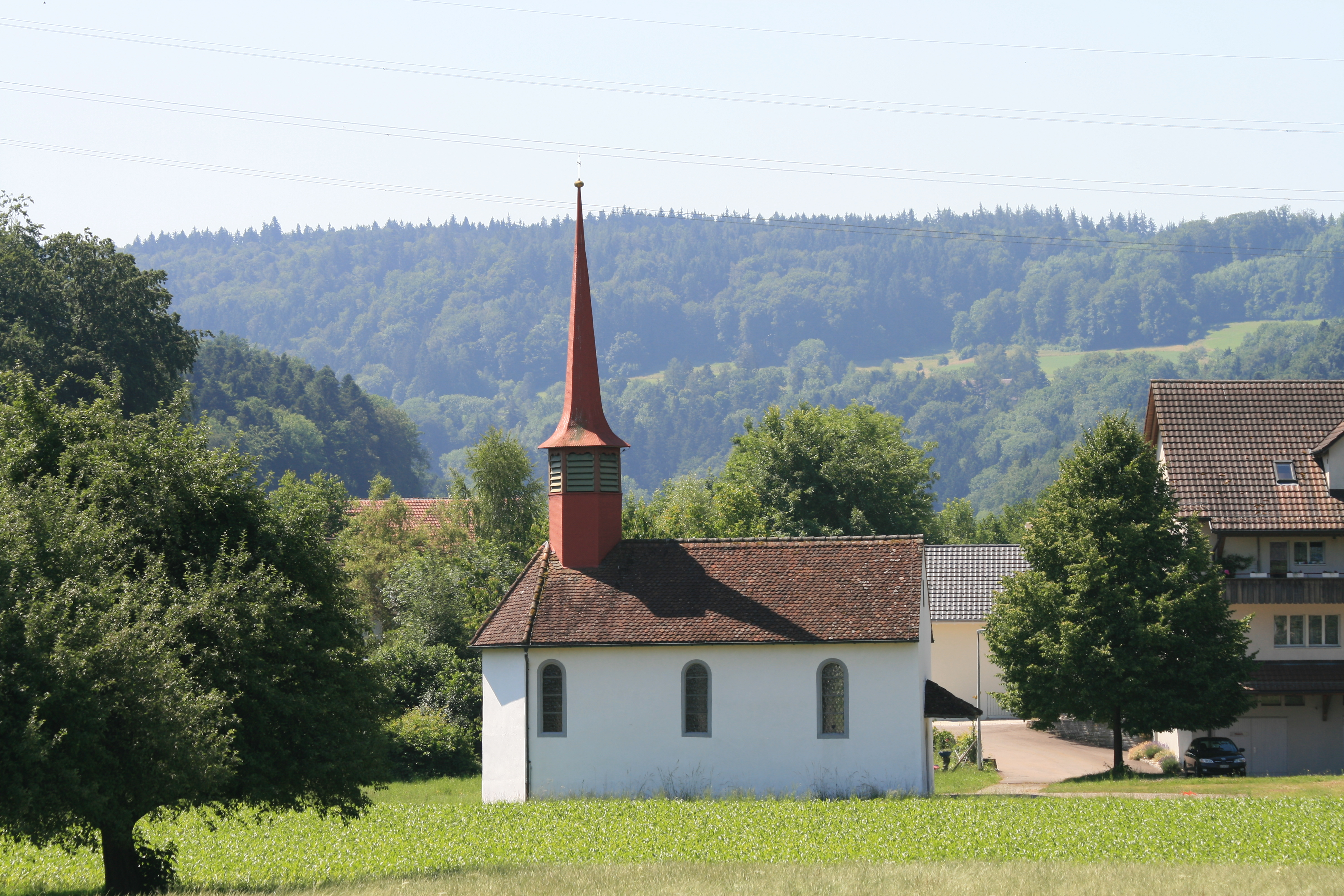 Kapelle von Fisibach, Kanton Aargau